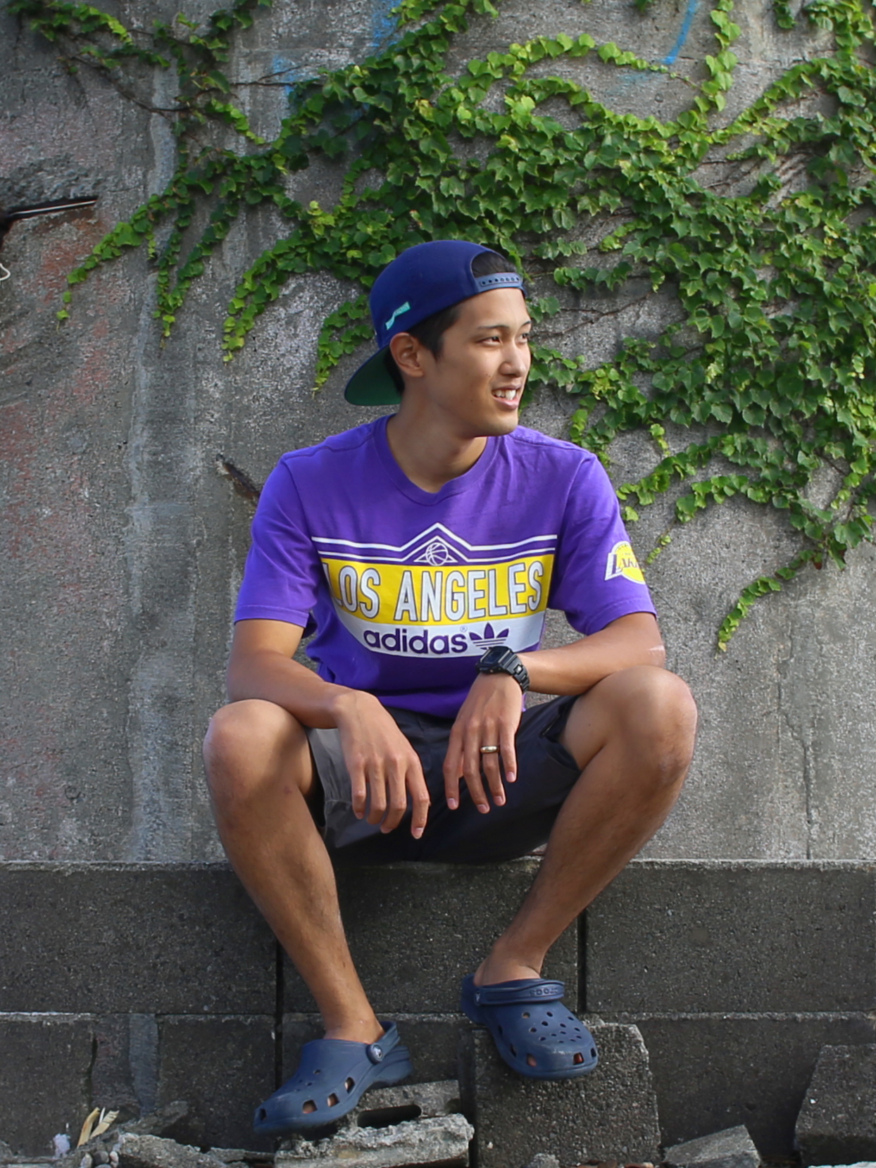 日本一周中に撮影したもの